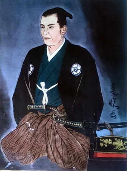 伊藤若冲作。